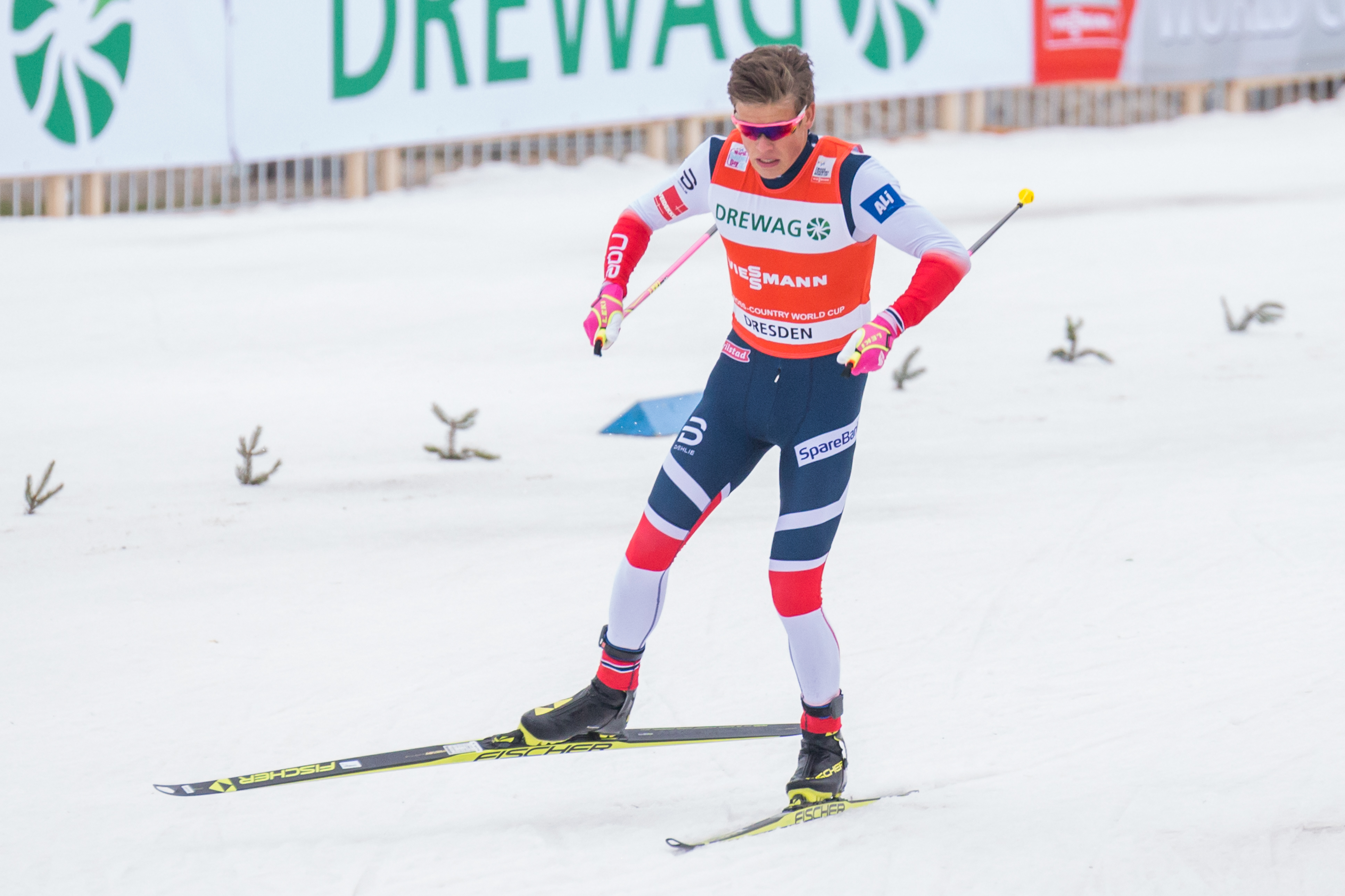 Johannes Hoesflot Klaebo (NOR, Norwegen)